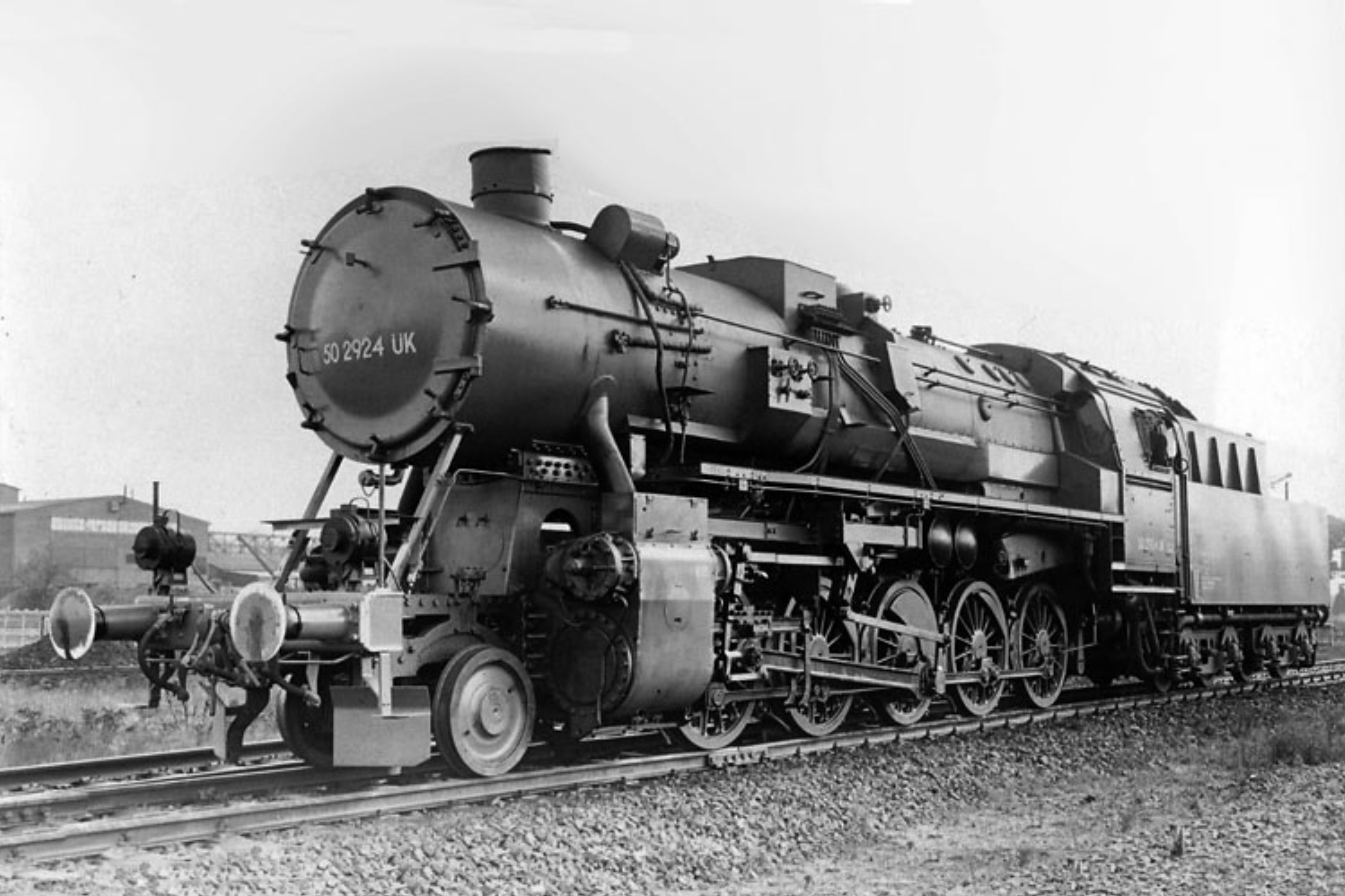 Lokomotive der DR-Baureihe 50 in der Ausführung als Übergangskriegslokomotive (50 2924, Baujahr 1942, Ausmusterung bei der DB 1975)